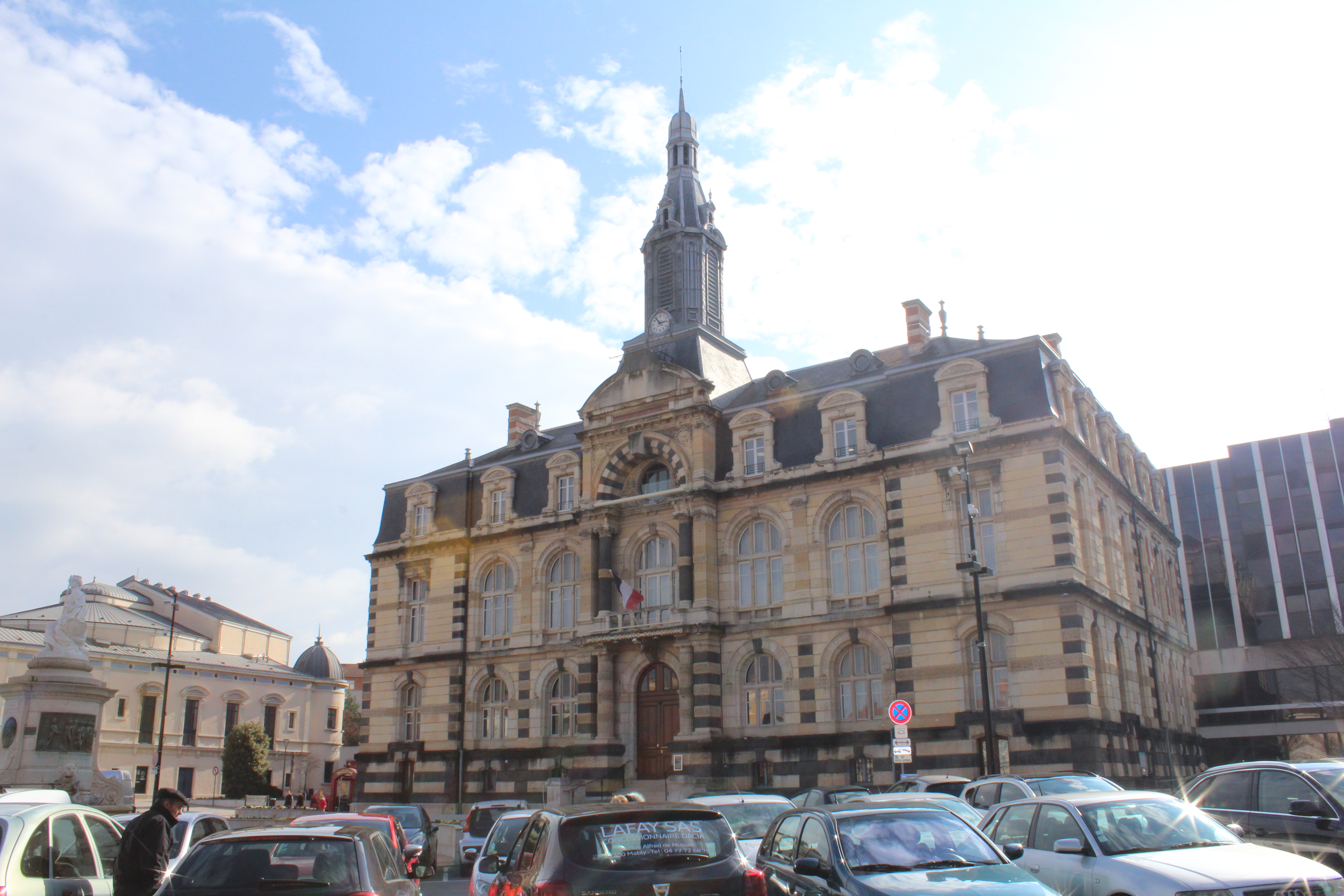 Hôtel de ville de Roanne.